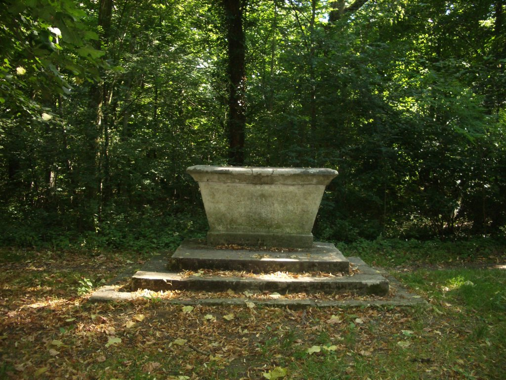 Le cénotaphe de Saint Mauxe dans la forêt de Bizy à Vernon (Eure), France